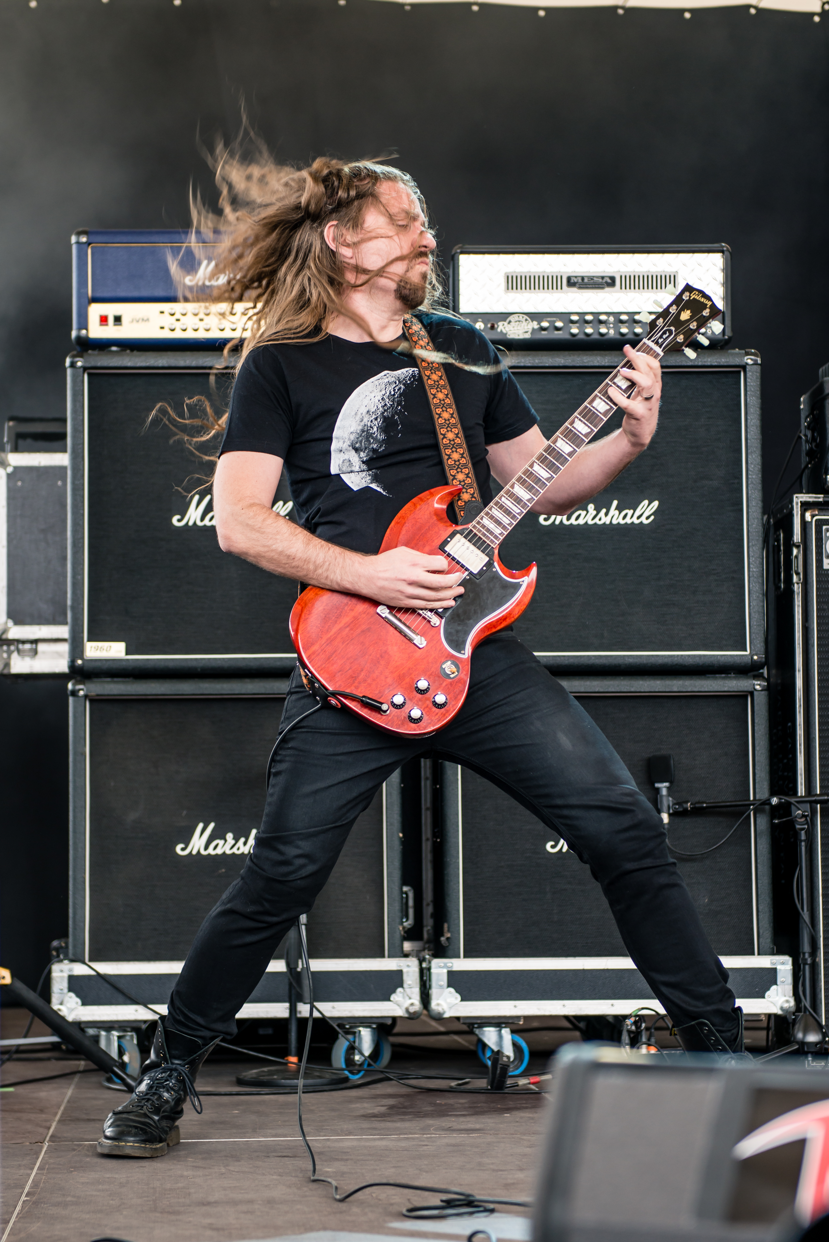 'Rock Hard Festival 2015; Gelsenkirchen Amphitheater': 'Avatarium'